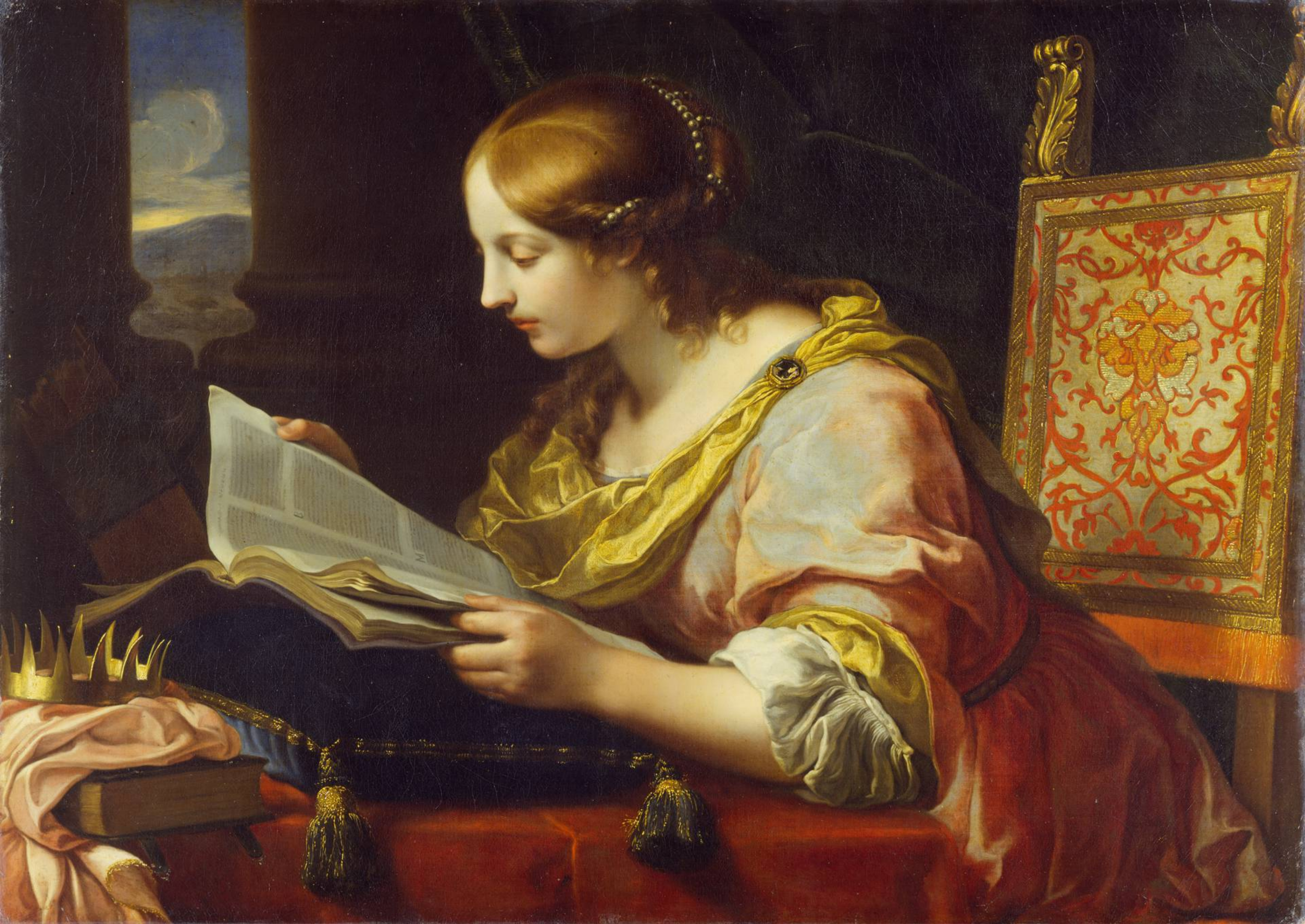 Santa Catalina leyendo